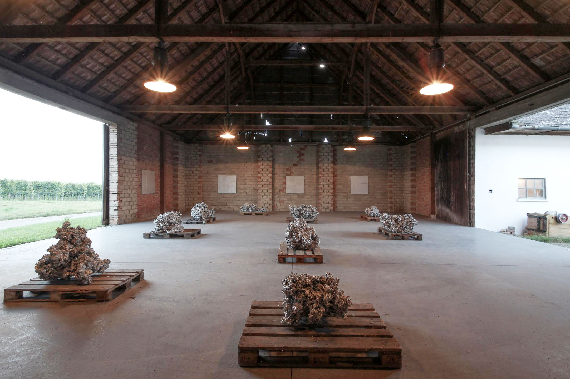 Abbildung einer Kunstinstallation von Jakob Gasteiger. Skulpturen aus Aluminium im Salzburg Museum